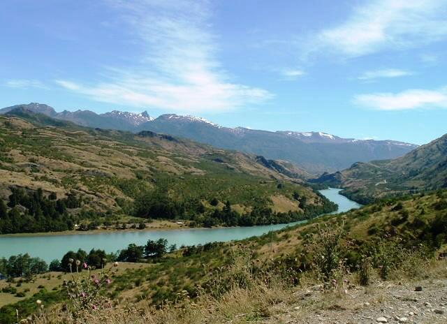 Río Baker, en la región de Aisén, Chile